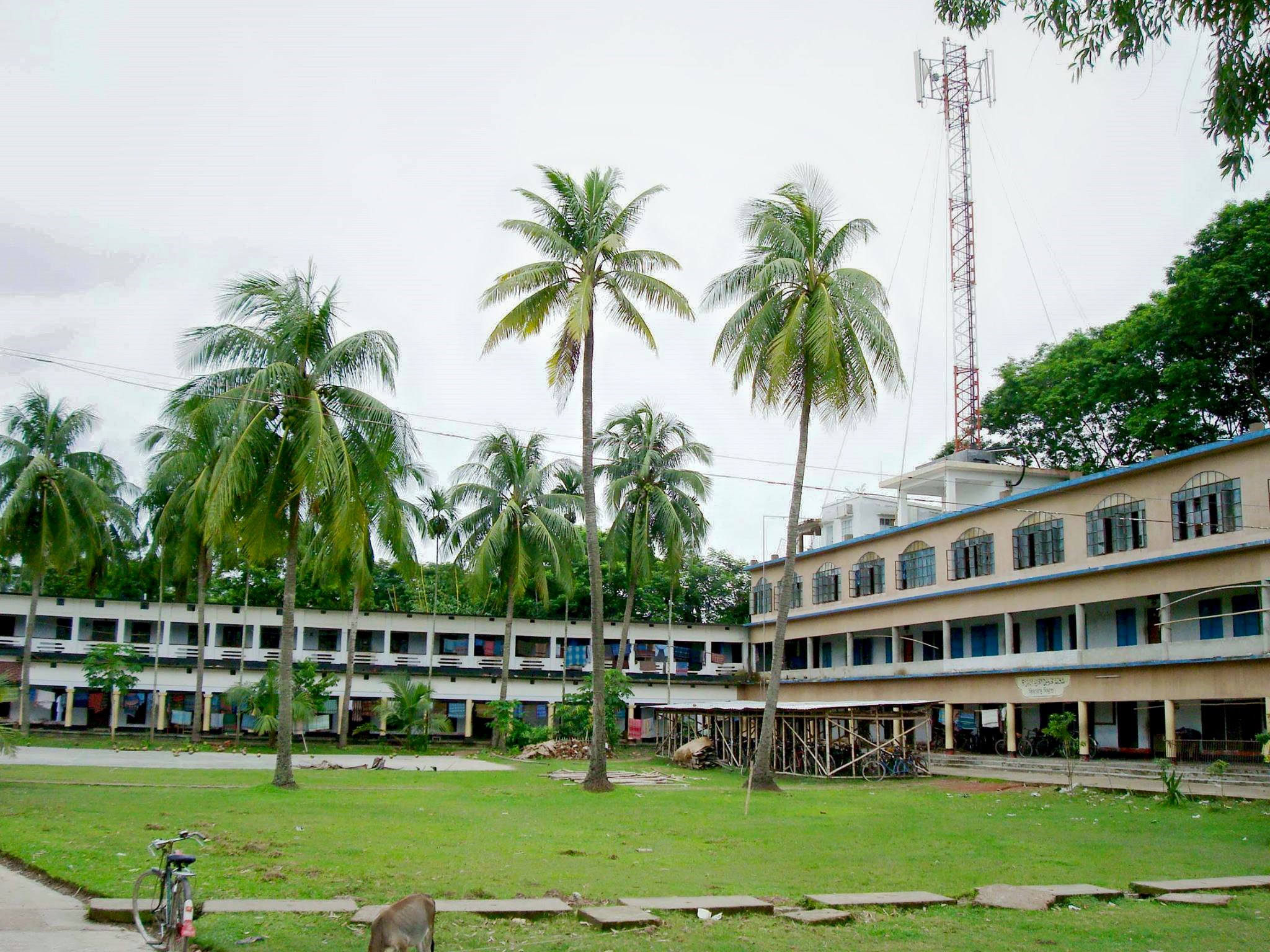 গওহরডাঙ্গা মাদ্রাসা